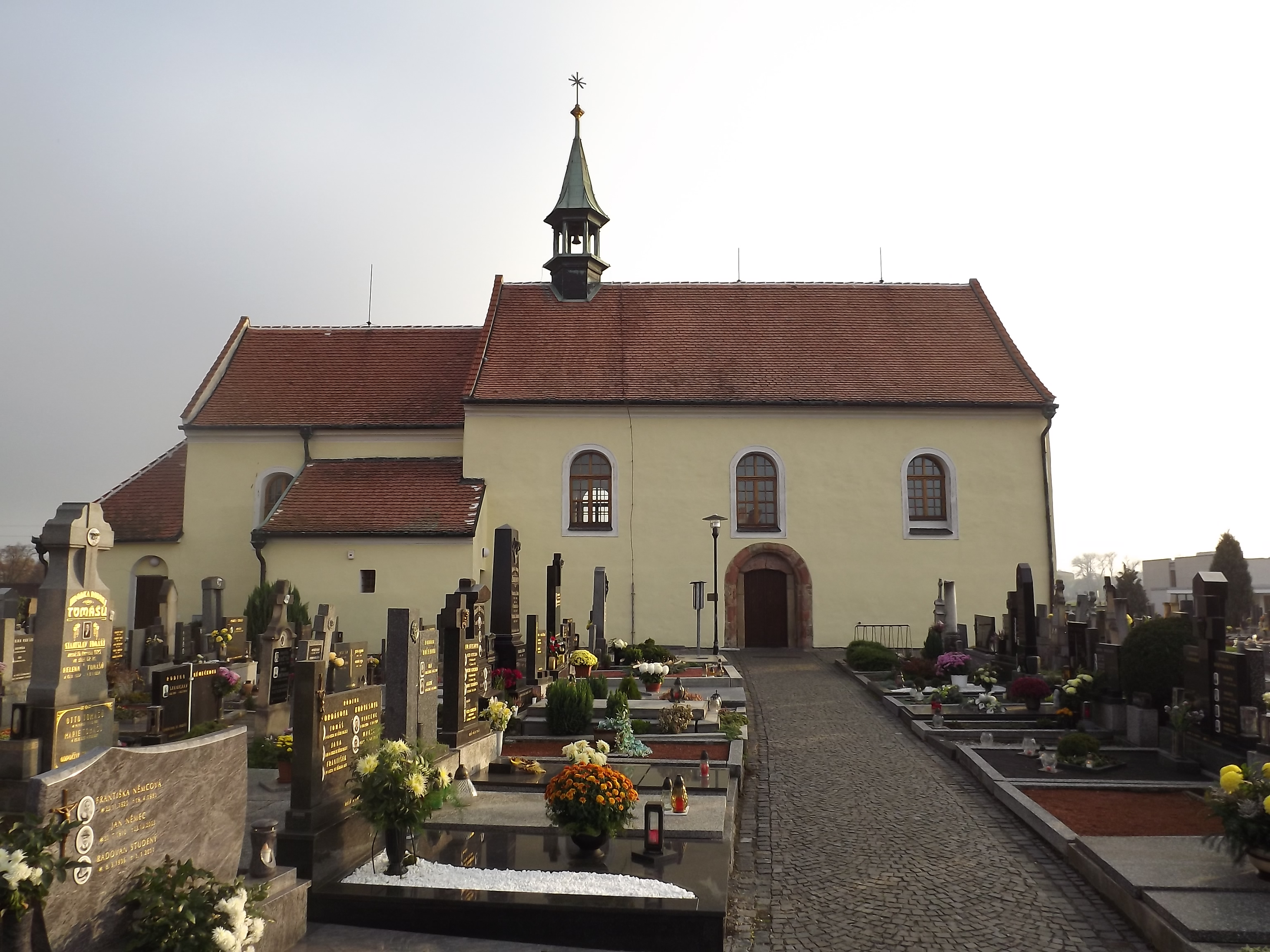 Kostel sv. Michala (Staré Město), Staré Město